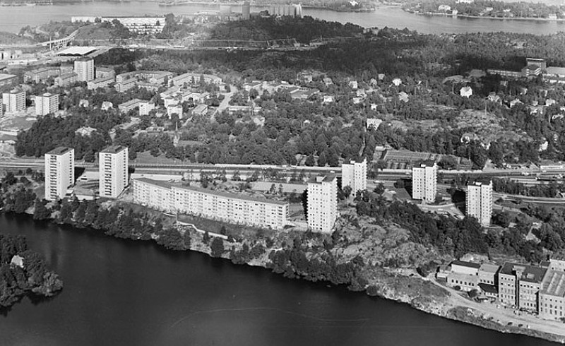 Ekudden, Nacka, i förgrunden. Även Finntorp och Talliden.